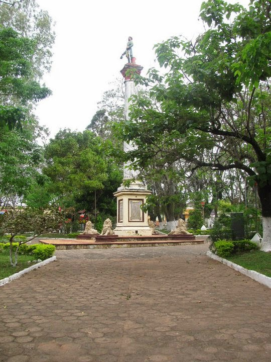 monumento plaza Gral.Diaz Carapeguá